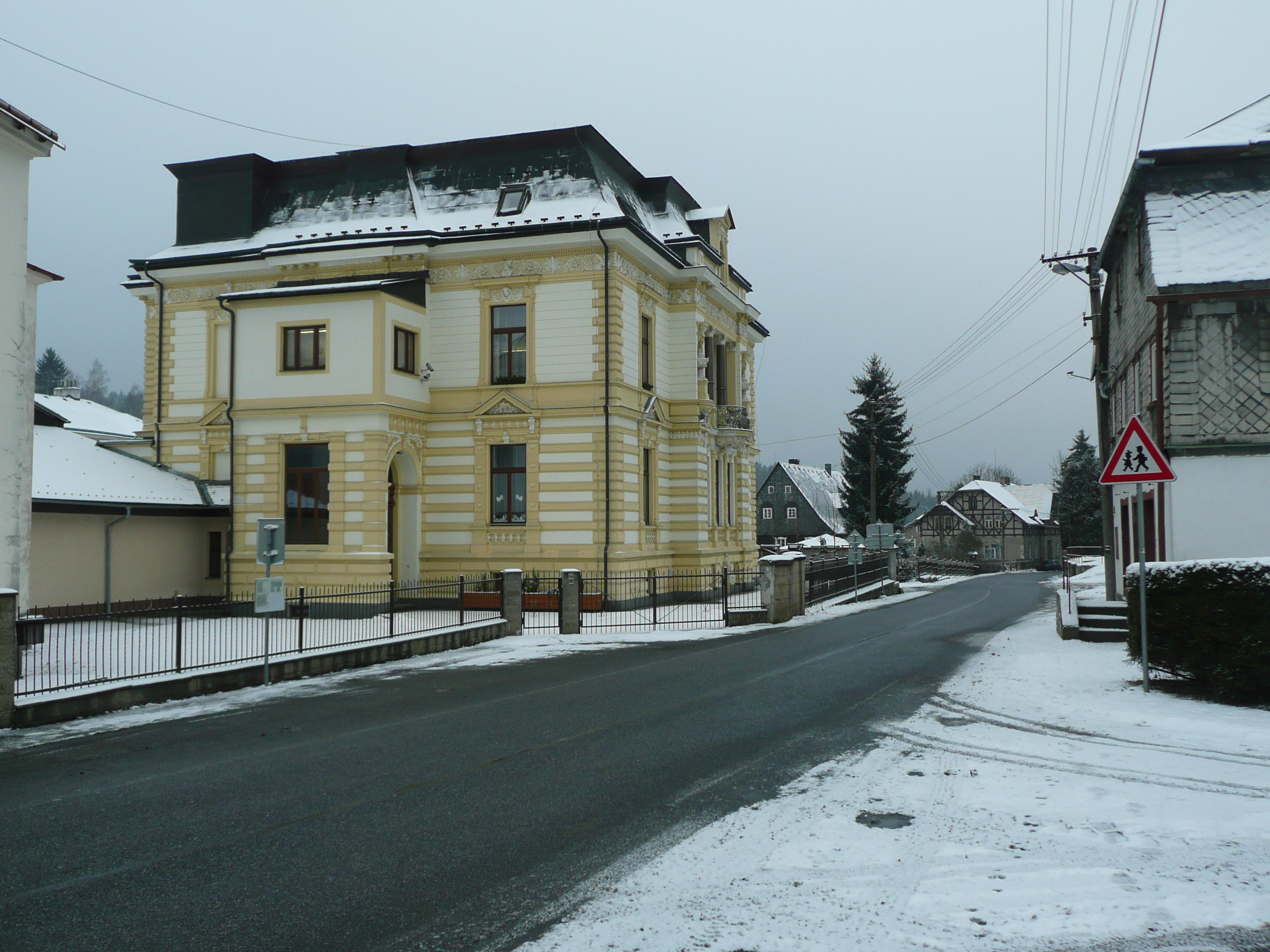 Kinderheim in Brtníky